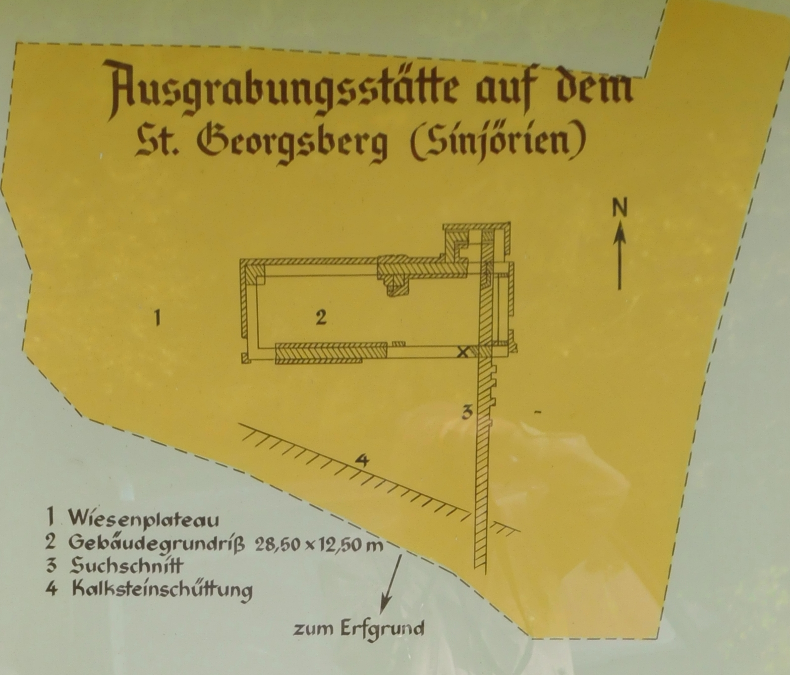 Grafik auf der Infotafel am St.-Georgsberg in Catterfeld